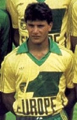 William Ayache en 1980, 'Football 1980 - 1981', Panini figurina.